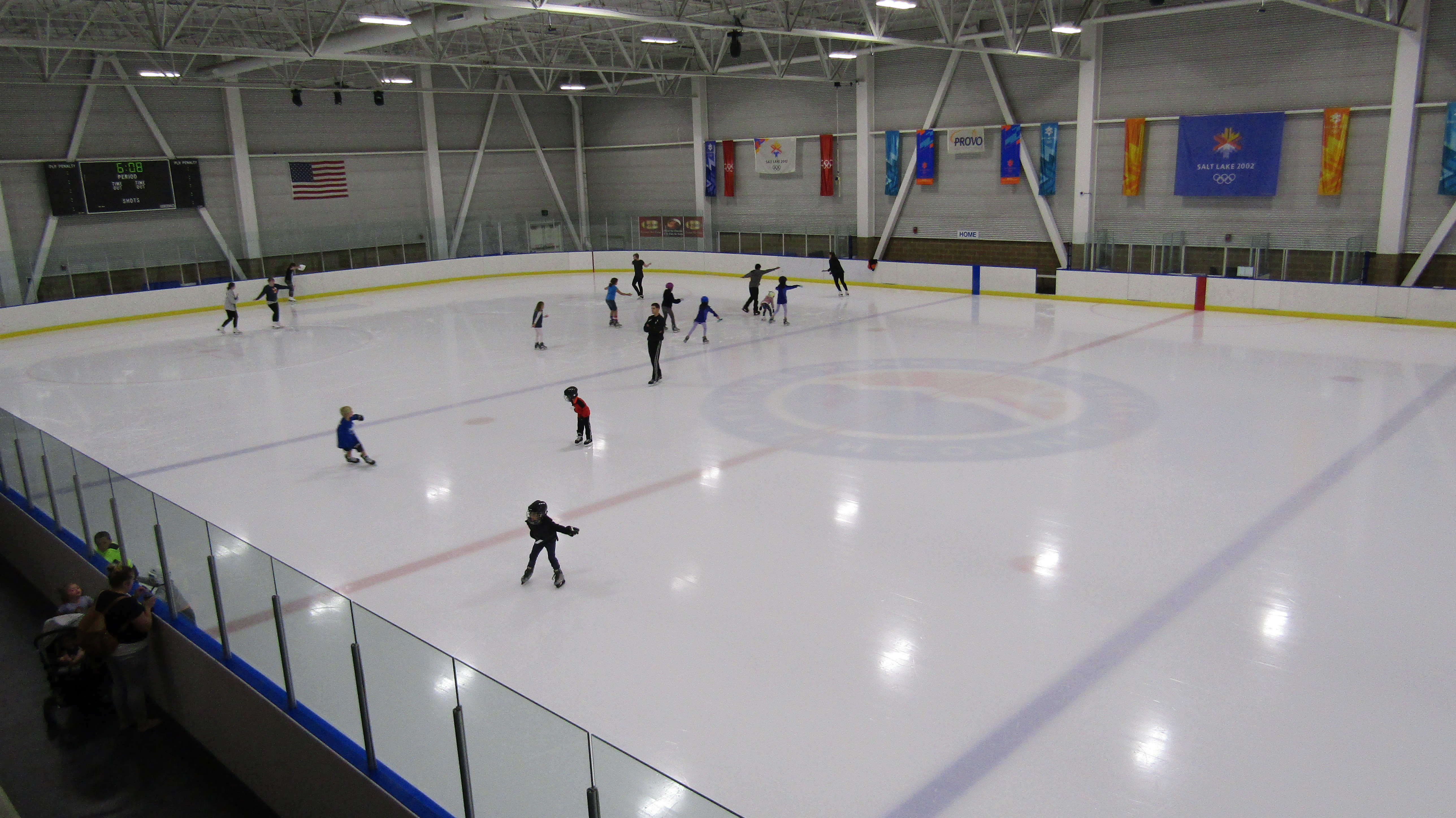 Ice skating rink in Peaks Ice Arena.